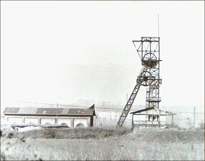 Ansicht der Schachtanlage Saale im Jahre 1982, kurz vor der Sprengung des Förderturms